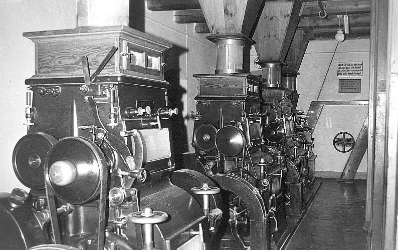 Original image description from the Deutsche FotothekTriebischtal-Miltitz. Furkertmühle, Inneres